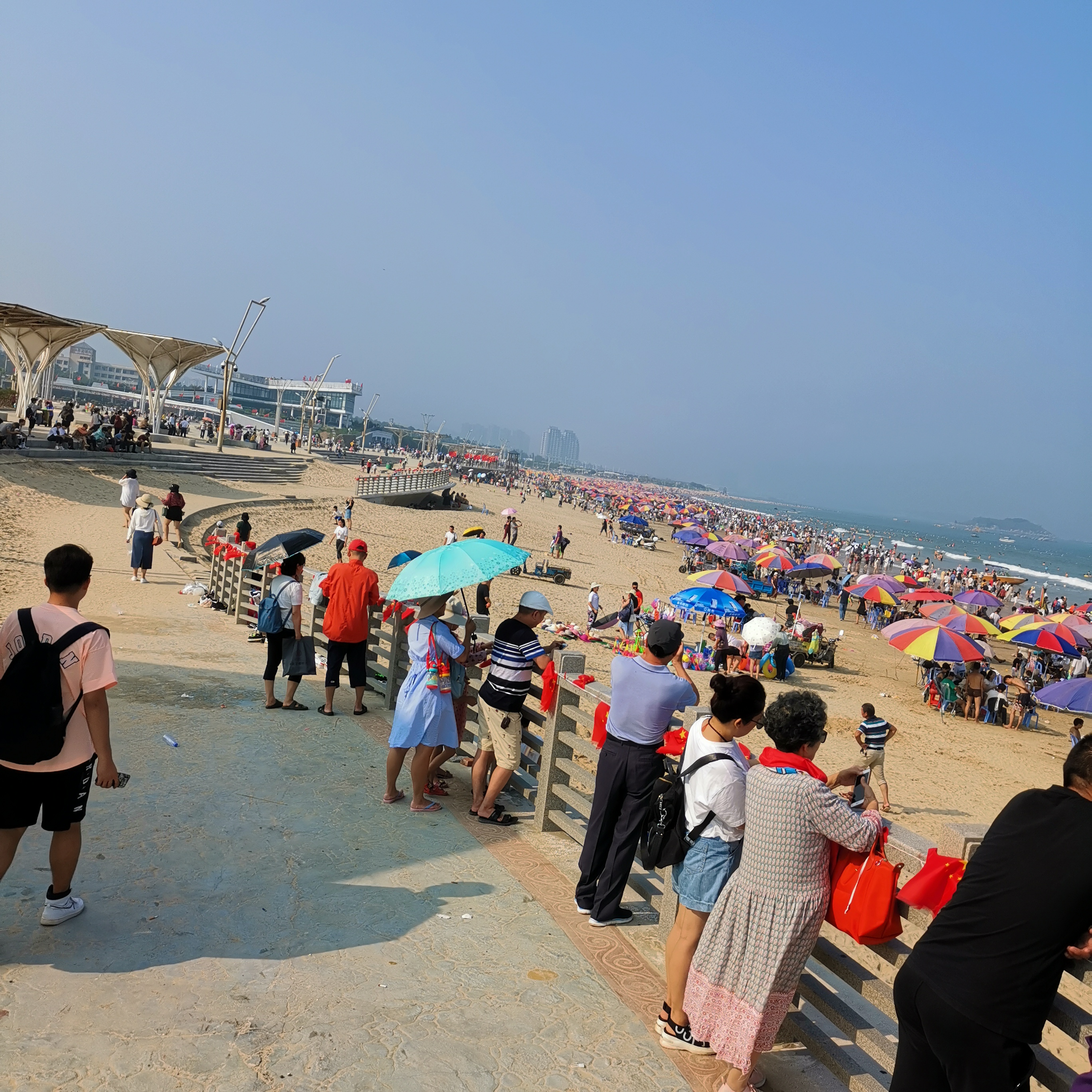 中文（中国大陆）: 龙凤头海滨公园